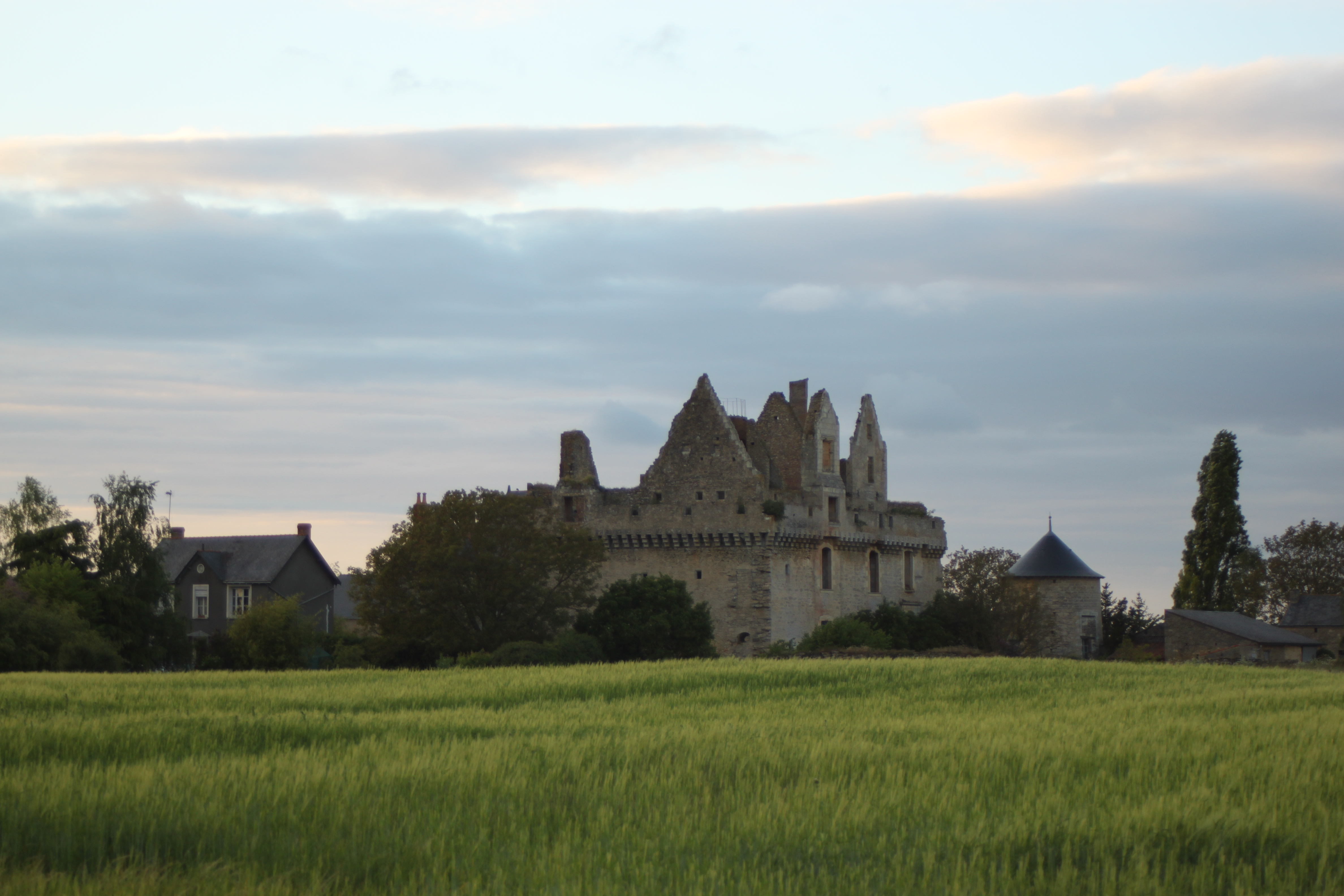 Château du Grand-Rioux, Fr-49-Tigné.